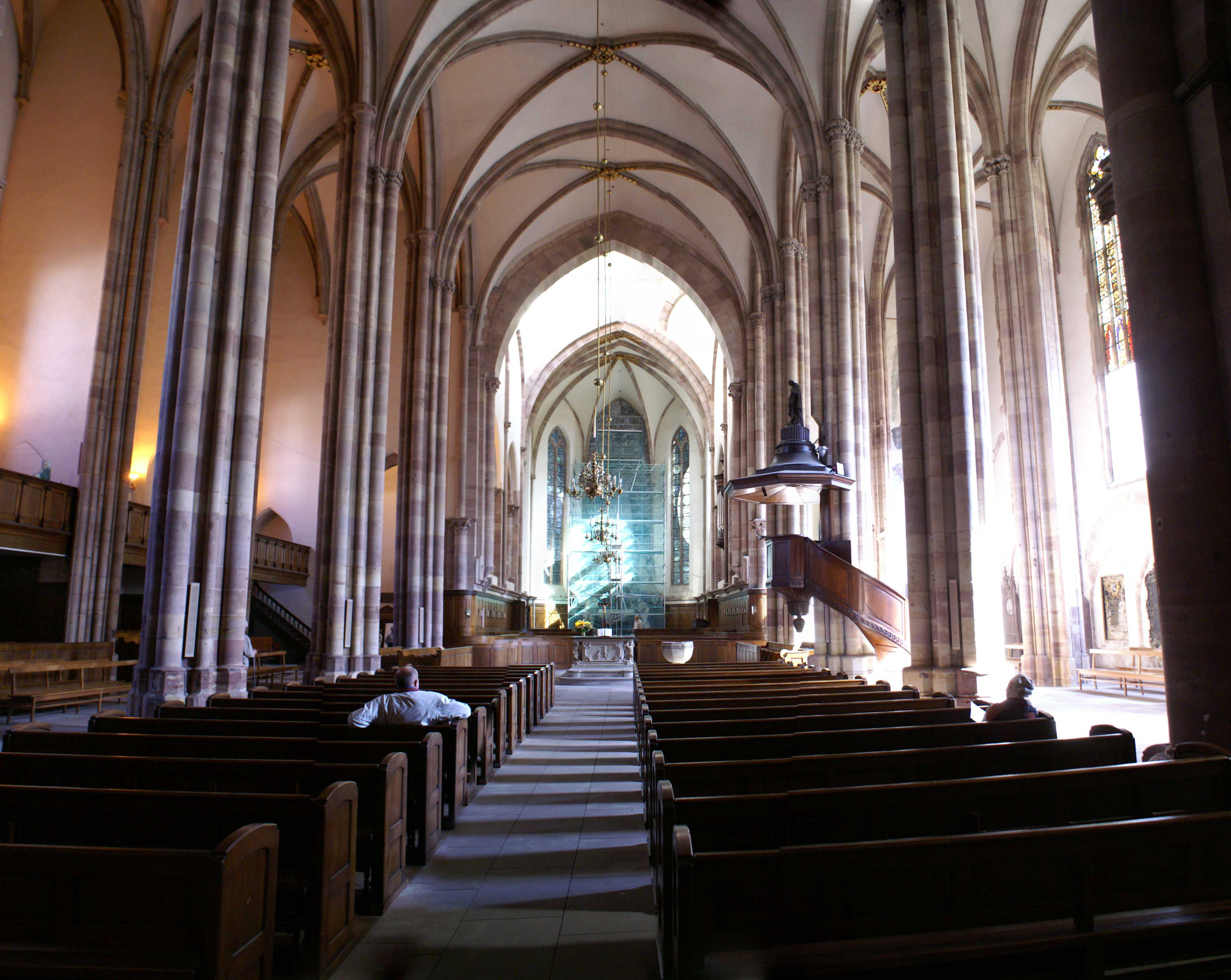 Église Saint Thomas - vue intérieure / St Thomas church - inside view - Strasbourg - France